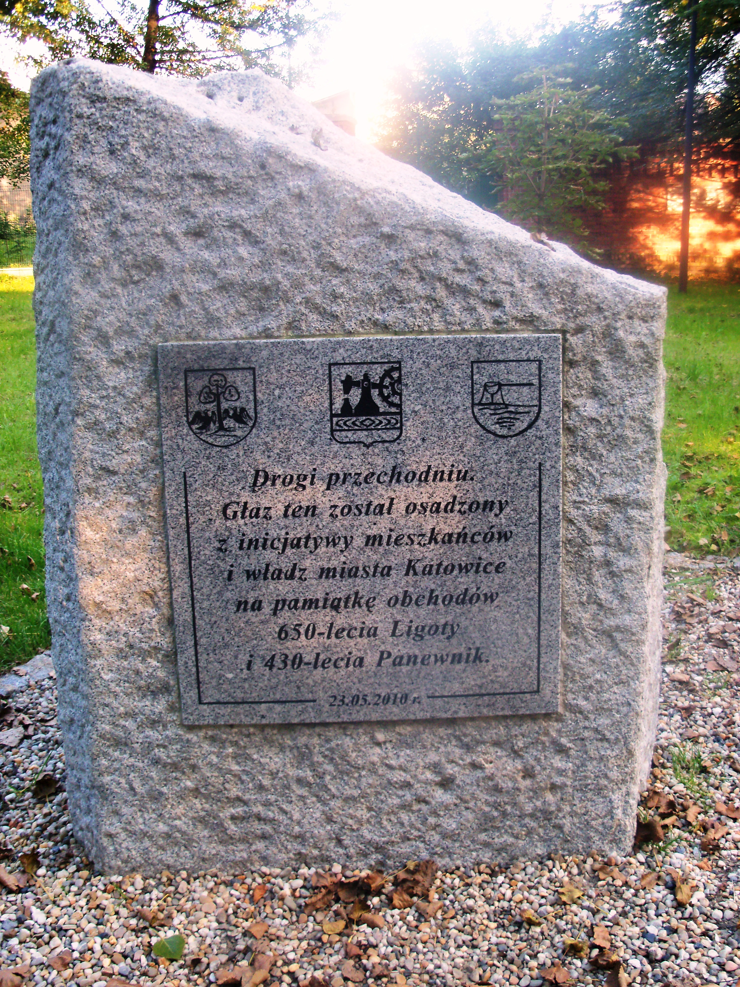 Tablica 650-lecia Ligoty i 430-lecia Panewnik - Katowice